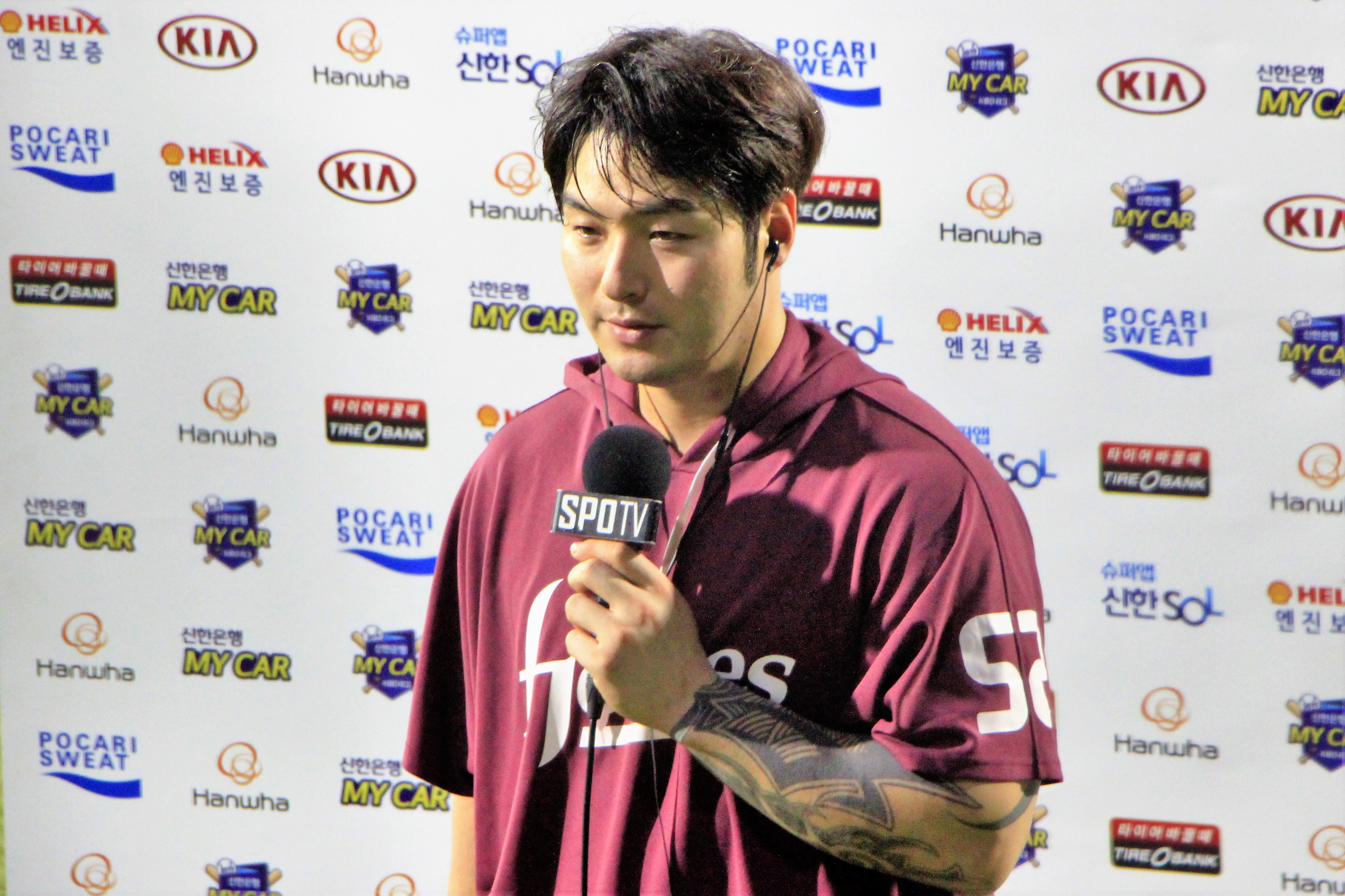 키움 히어로즈의 박병호 선수가 청주야구장에서 인터뷰하는 모습.